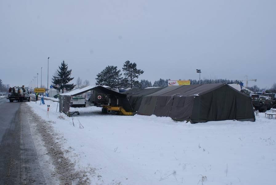 Slovenska vojska tudi v novem letu podpira oskrbo migrantov.